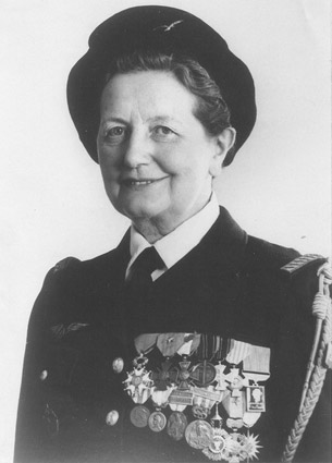 Suzanne Jannin a fine carriera... qualcuno mi aiuta ad identificare tutte le medaglie appese sulla sua giacca? Alcune sono riuscita ad identificarle, altre no...